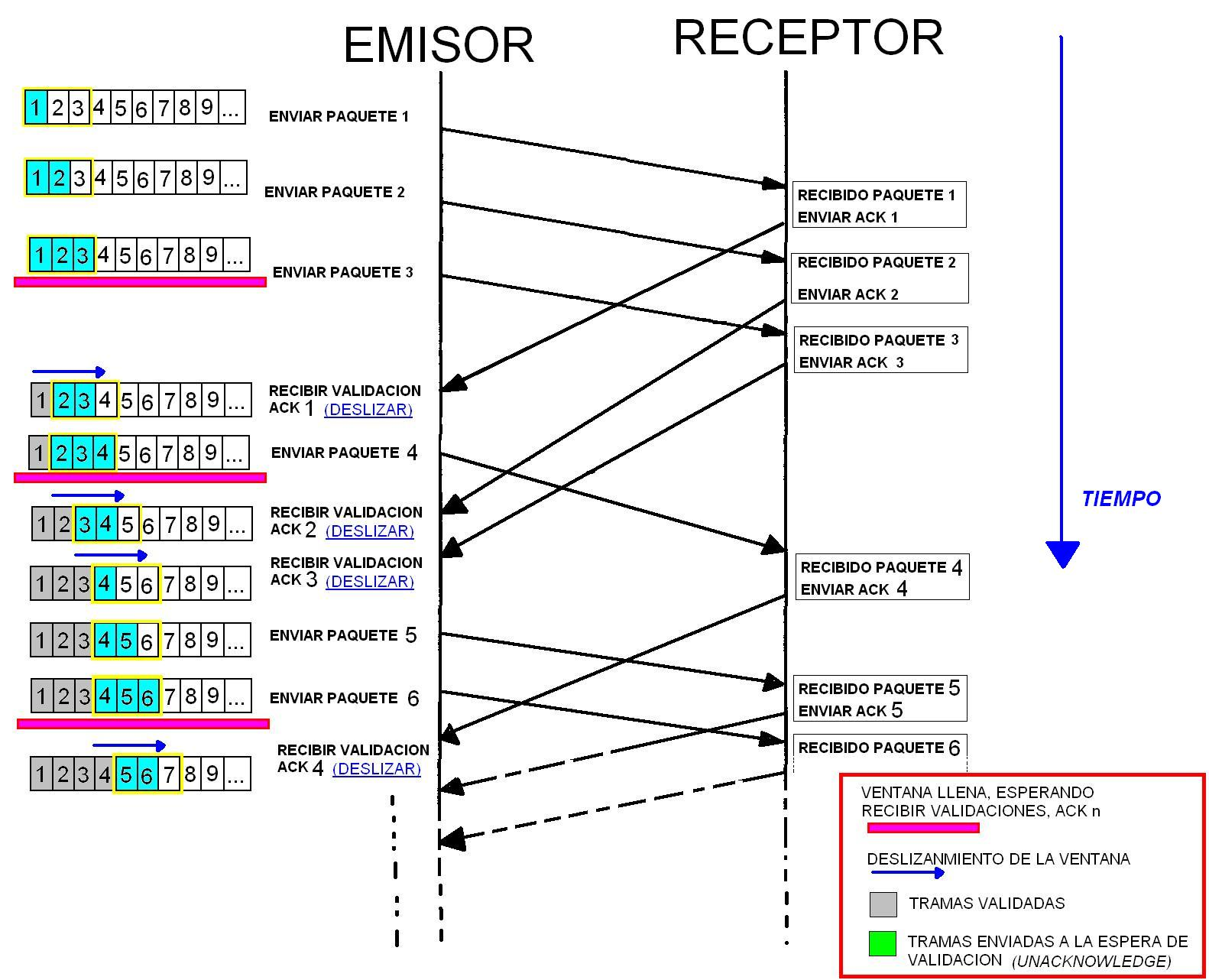 funcionamiento de la ventana deslizante durante el intercambio de información